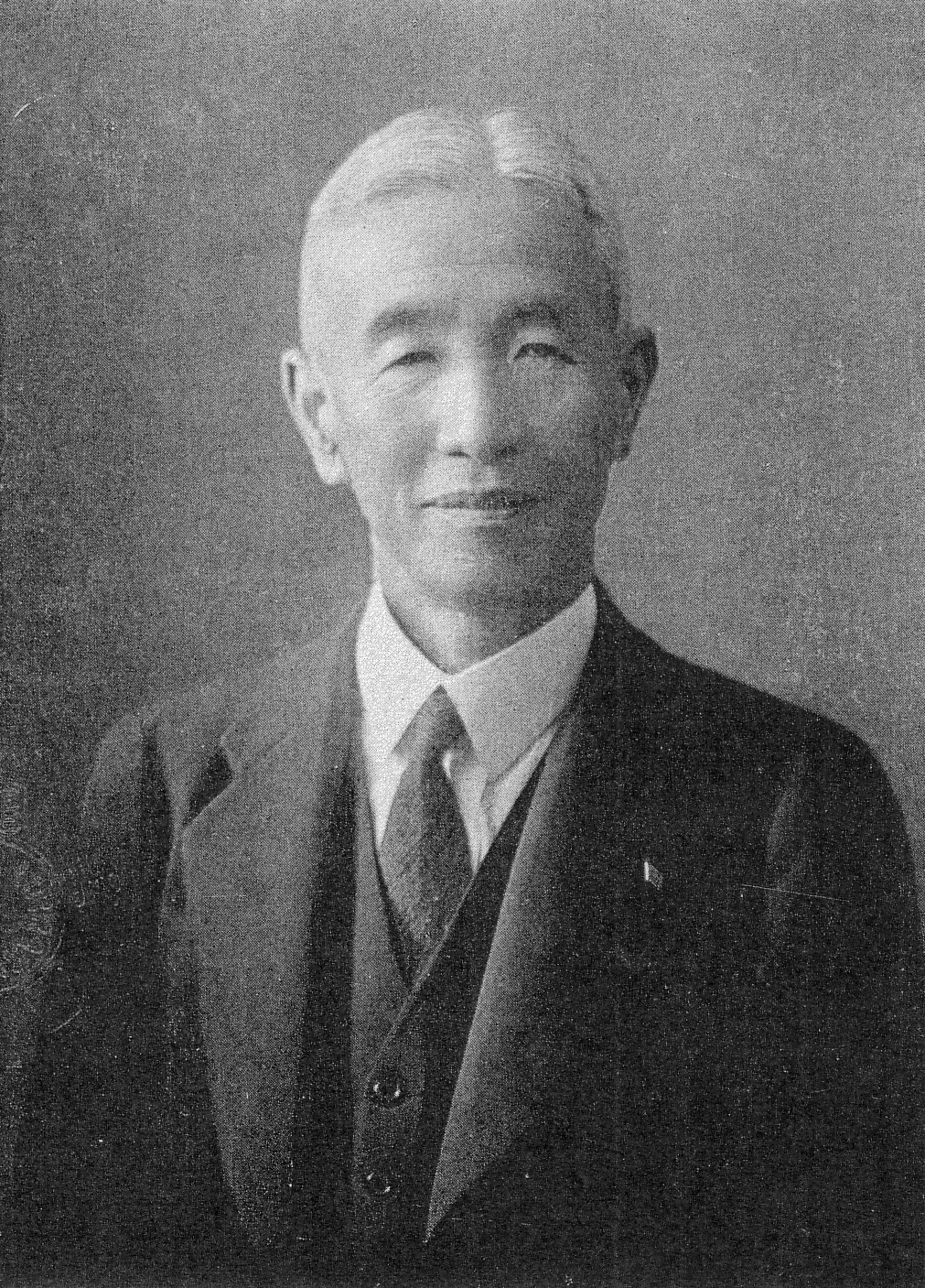 古稀の相馬半治